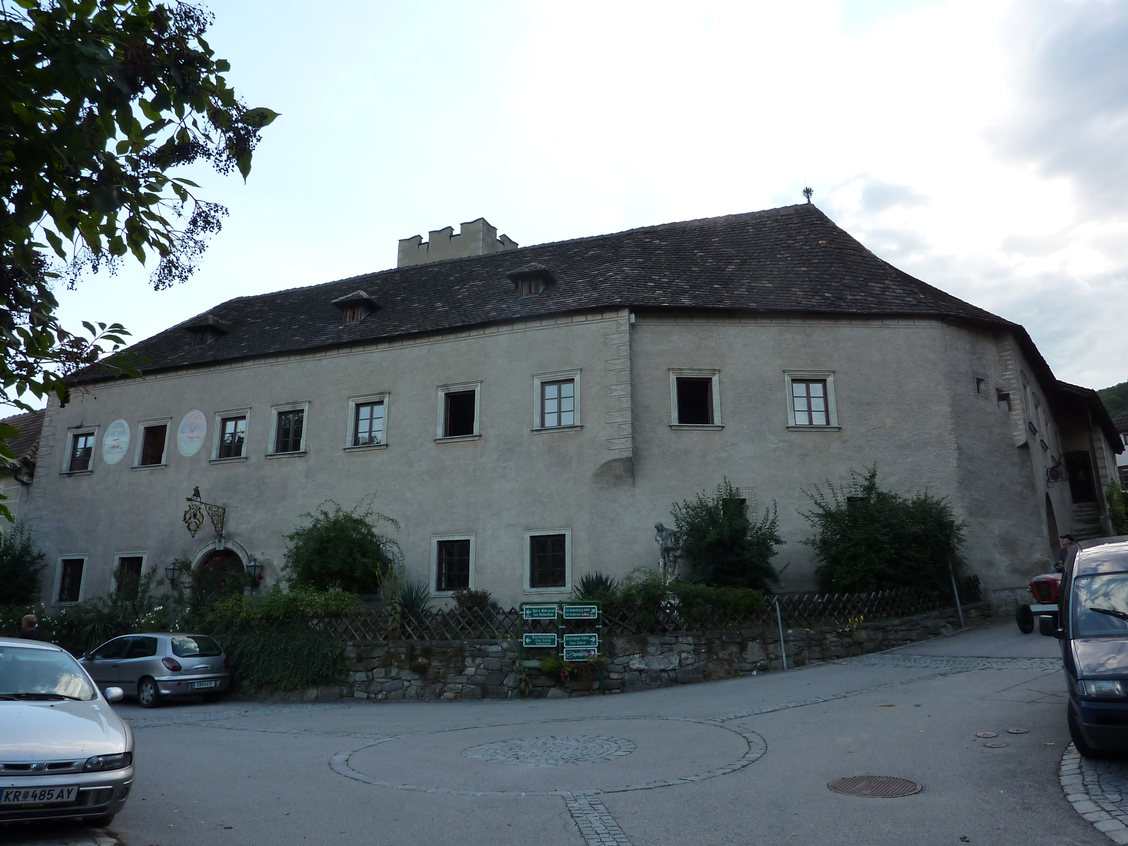 Schloss, Glöckerl vom Schwallenbach, Schwallenbach 27, Spitz, Niederösterreich